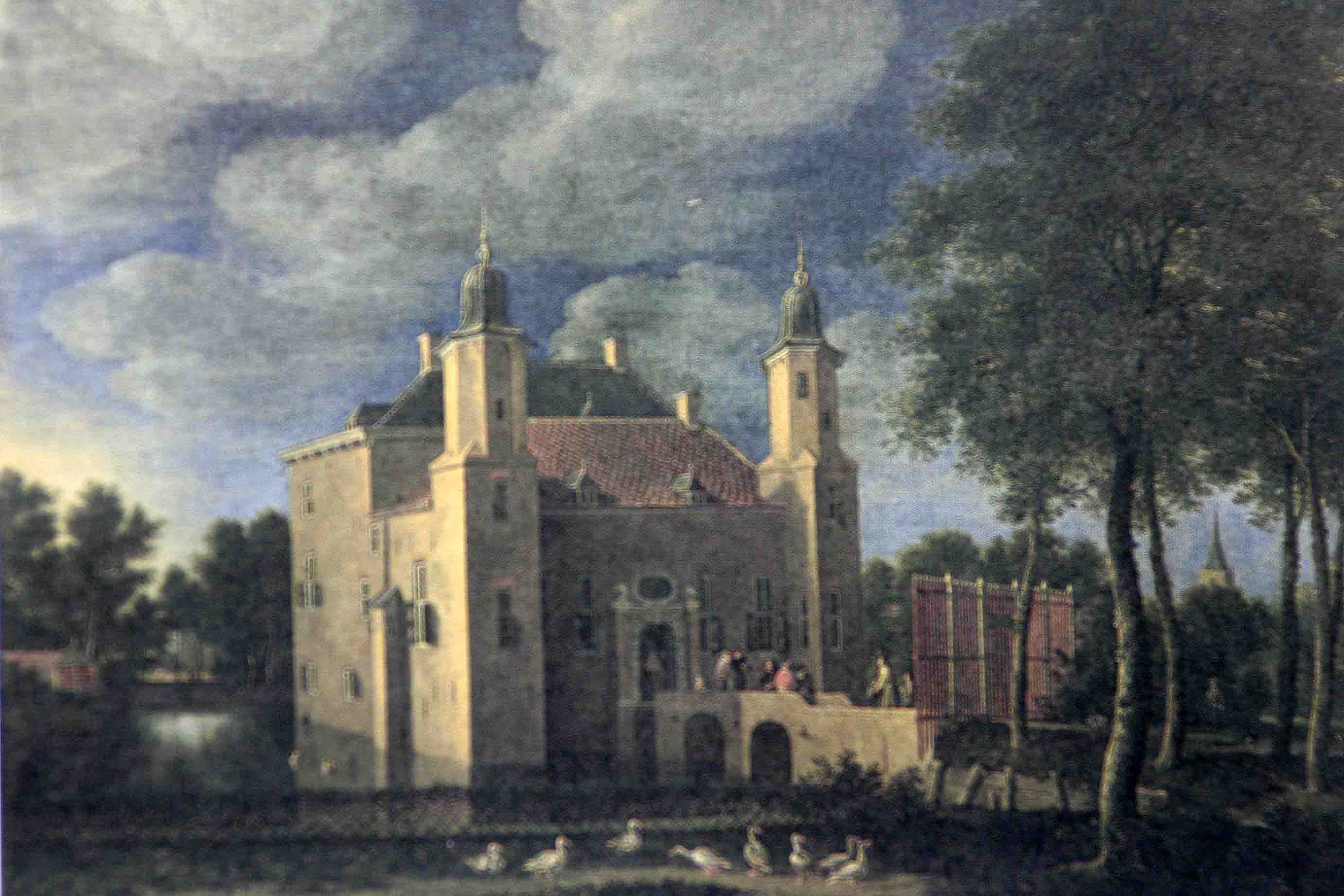 Huis te Linschoten in Linschoten. Olieverf op doek.